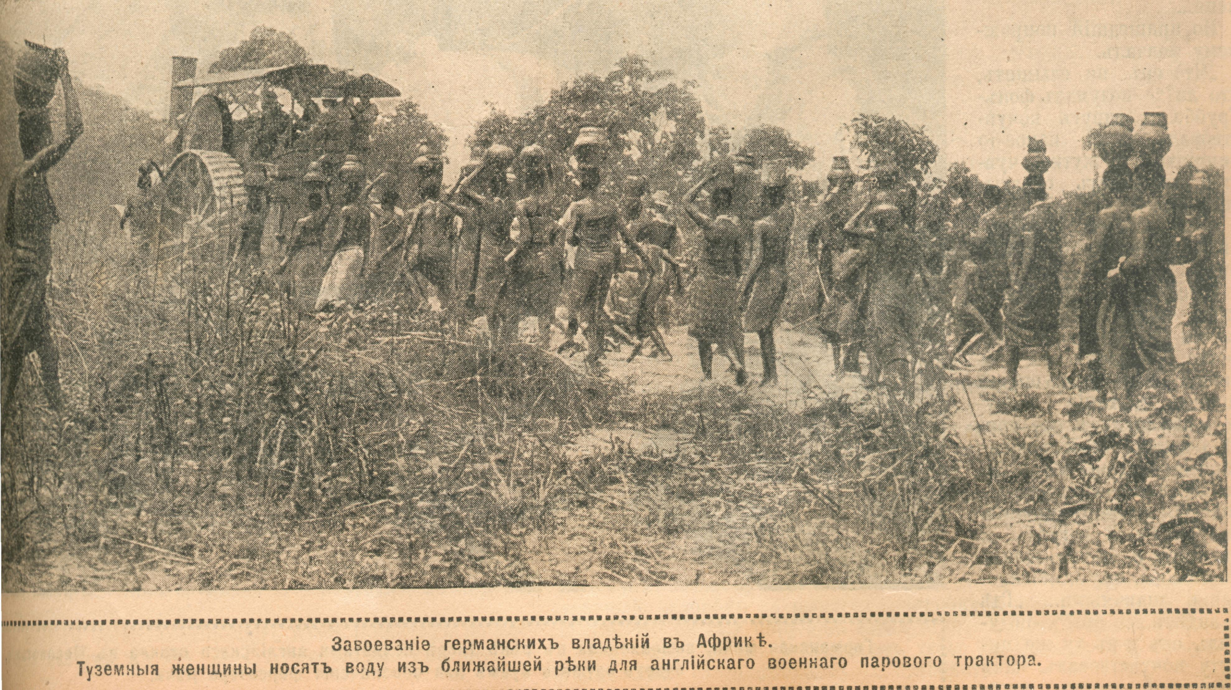 Туземные женщины Танганьики носят воду для военнго англ.парового трактора. Немецко-английская война в Африке.